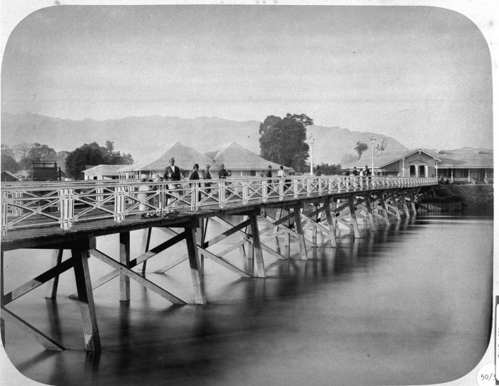 Foto. Brug bij Pante Perak over de Atjeh-rivier te Koetaradja in Atjeh